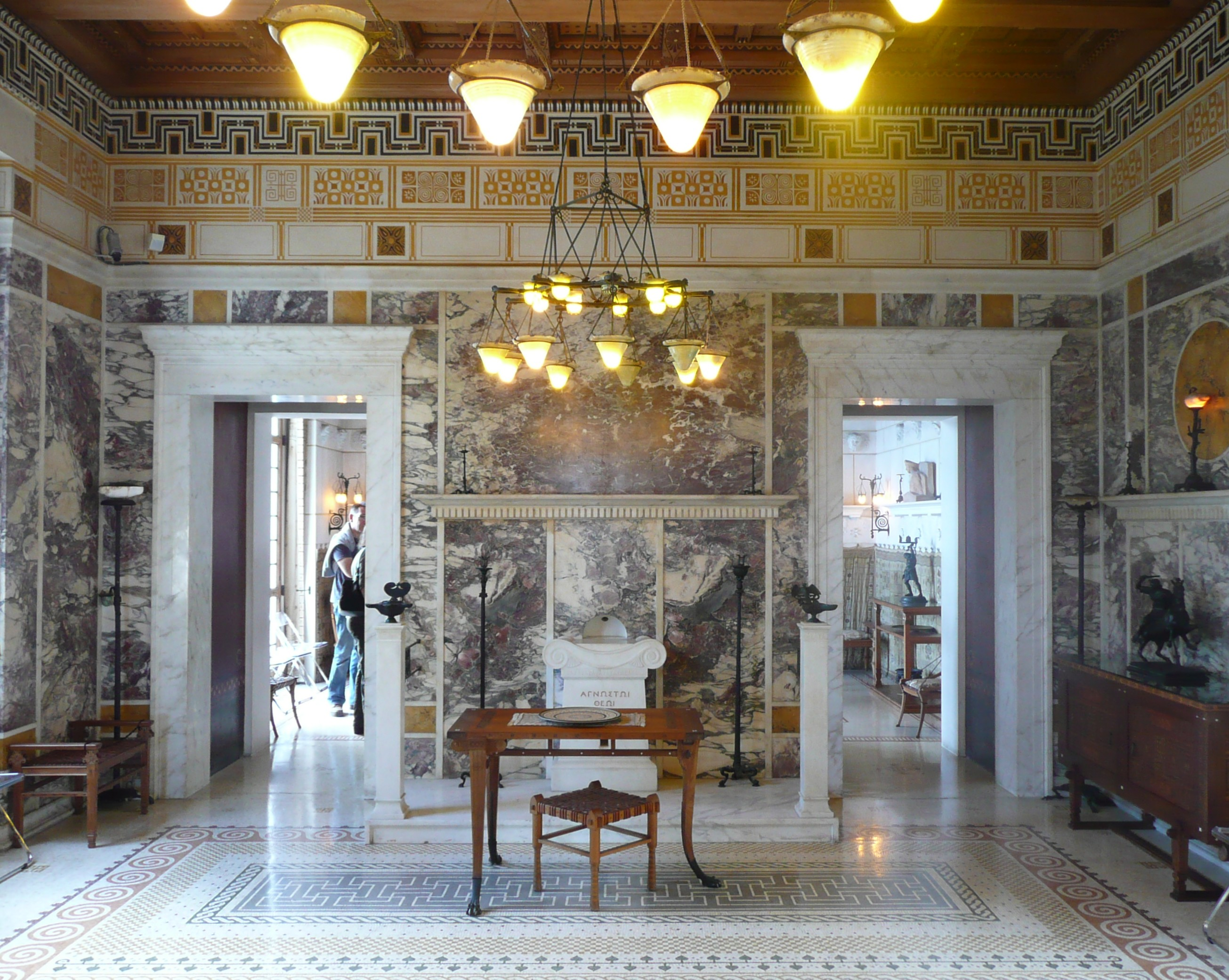 A Beaulieu-sur-Mer (Alpes-Maritimes, France), villa Kérylos, Andron (salon des hommes), grand salon, communication avec le petit salon ou Oïkos.